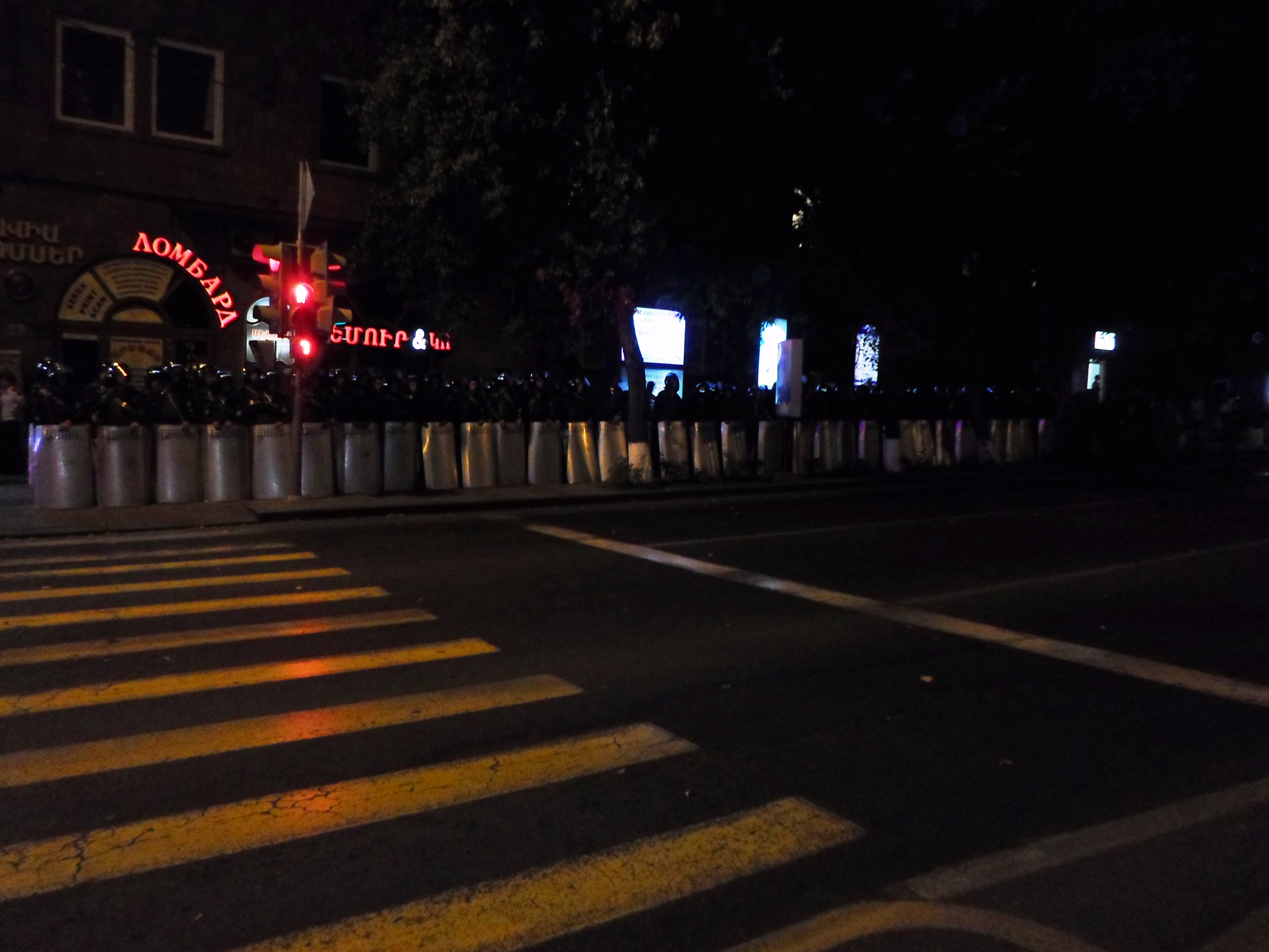 Проспект Баграмян, 11 сентября 2015 года